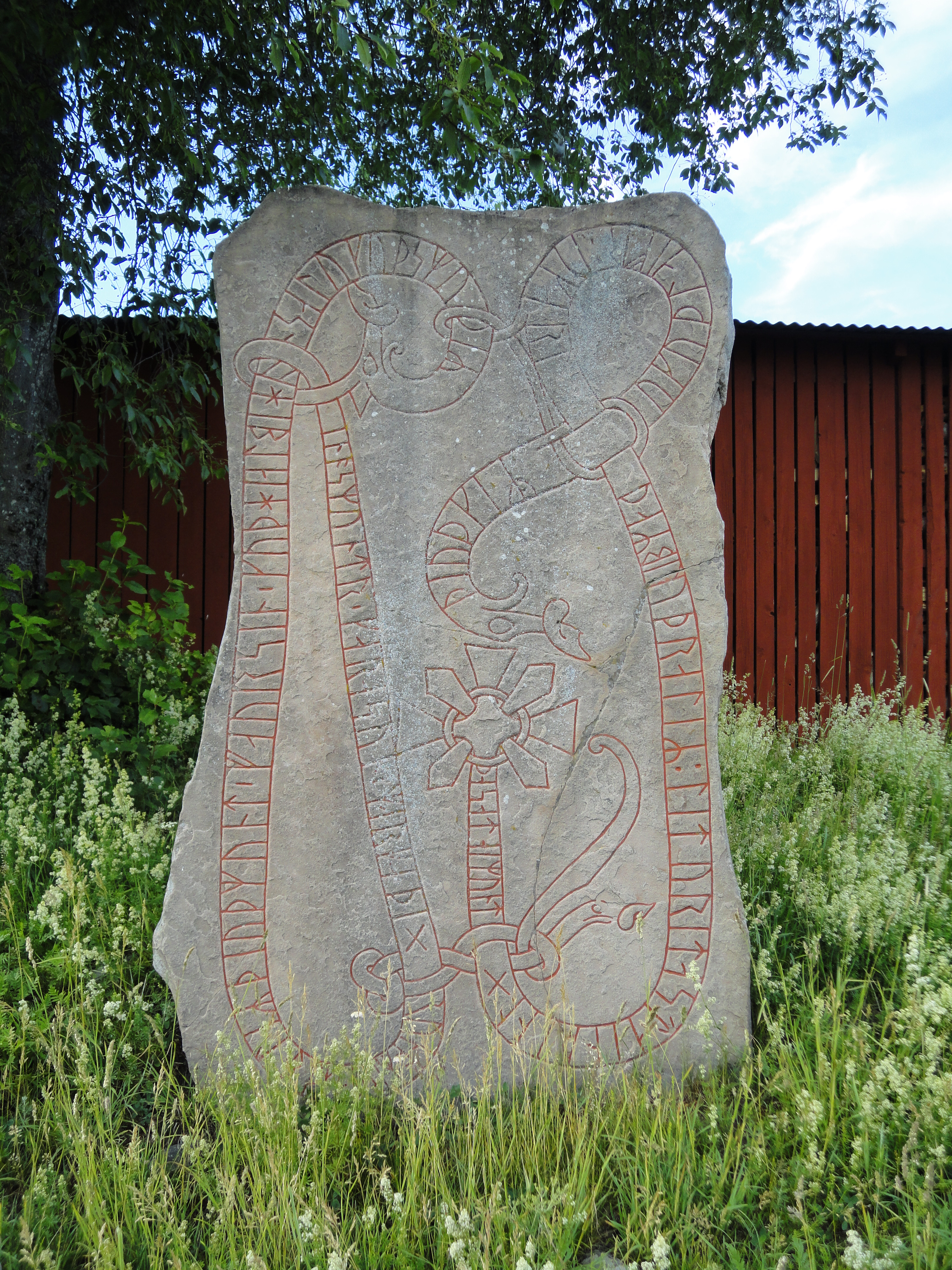 Gs 11, Järvsta utanför Gävle.